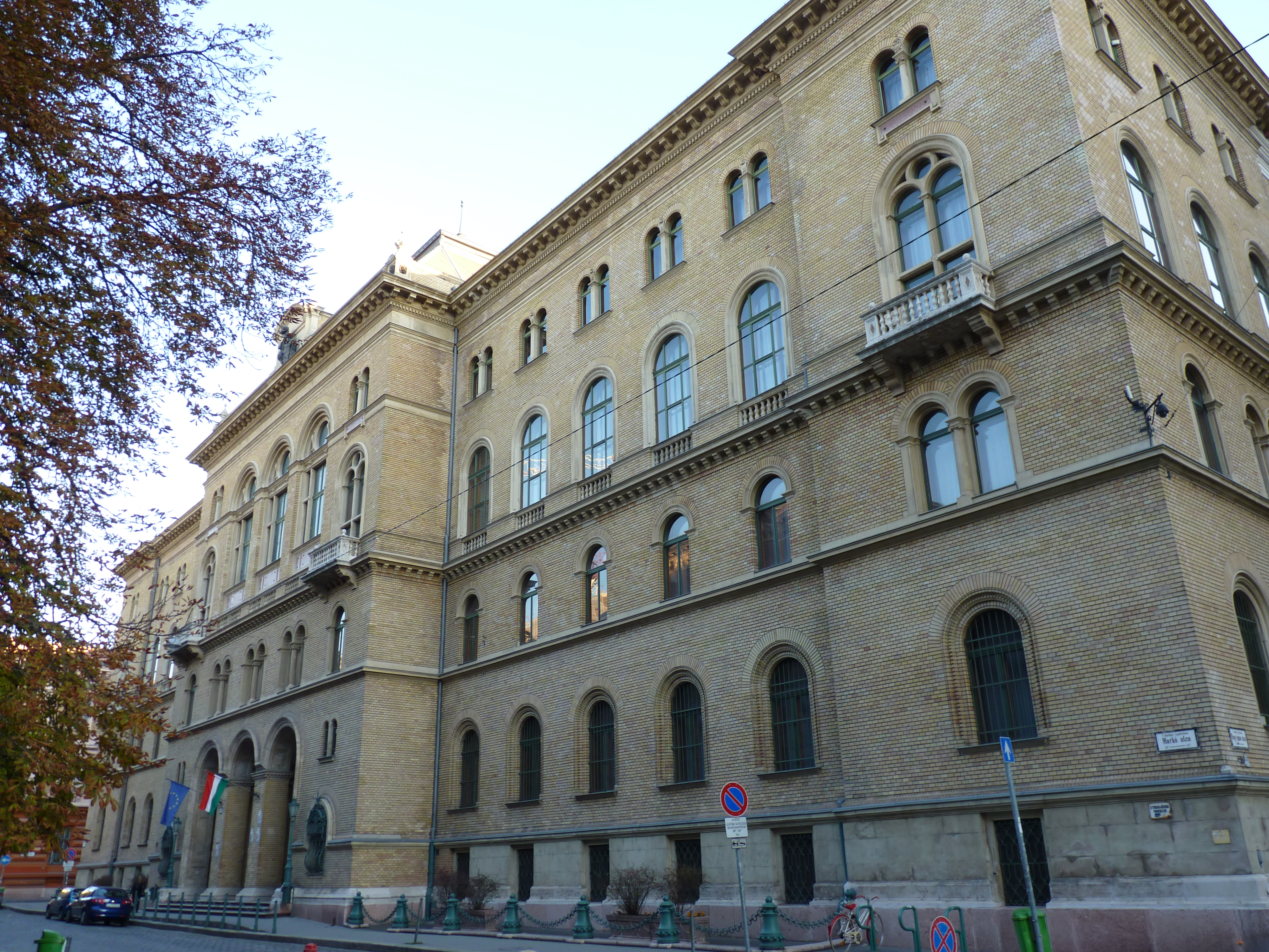 A Fővárosi Törvényszék épülete This is a photo of a monument in Hungary. Identifier: 11361